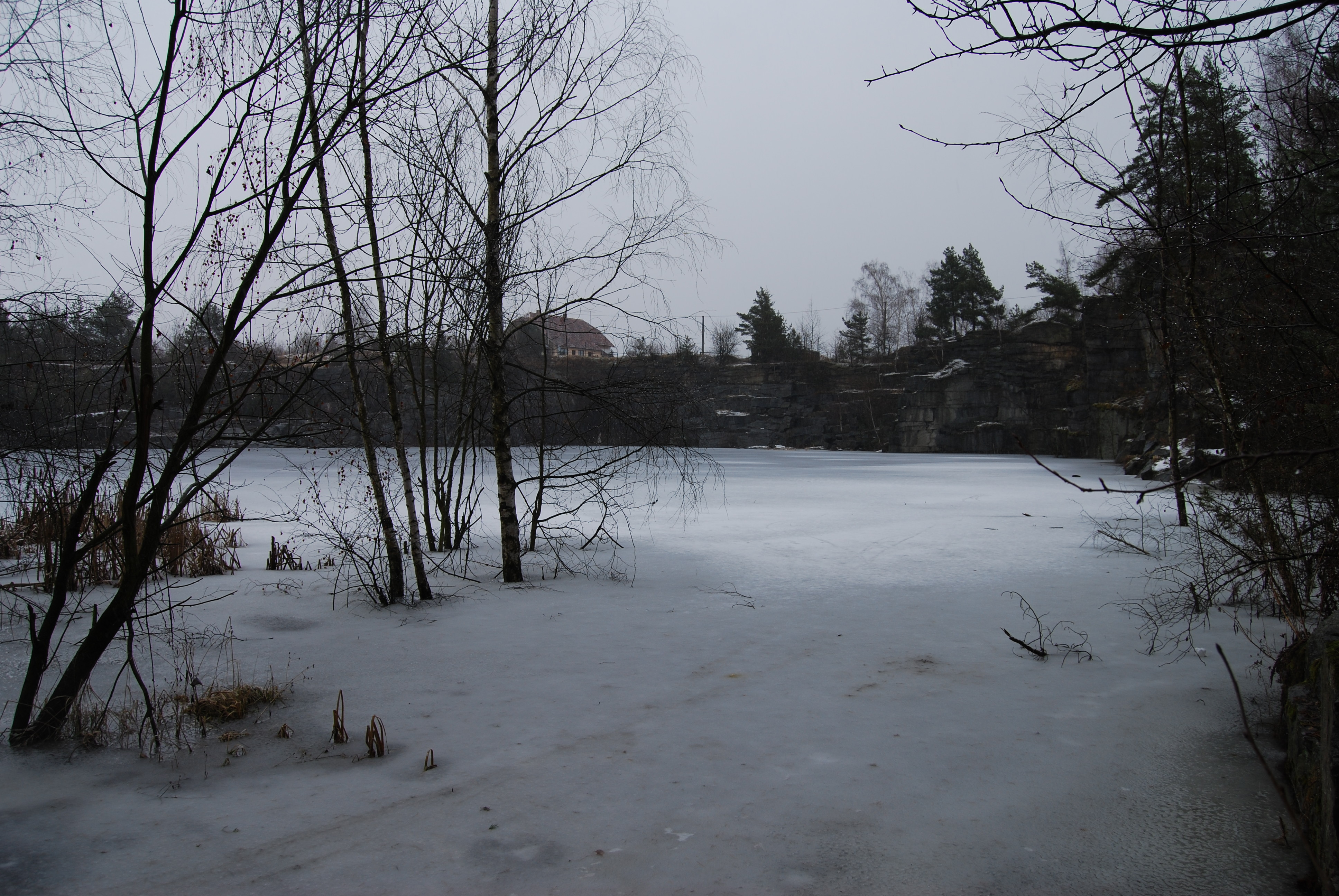 Zatopený lom v okolí obce. Kozárovice. Okres Příbram. Česká republika.